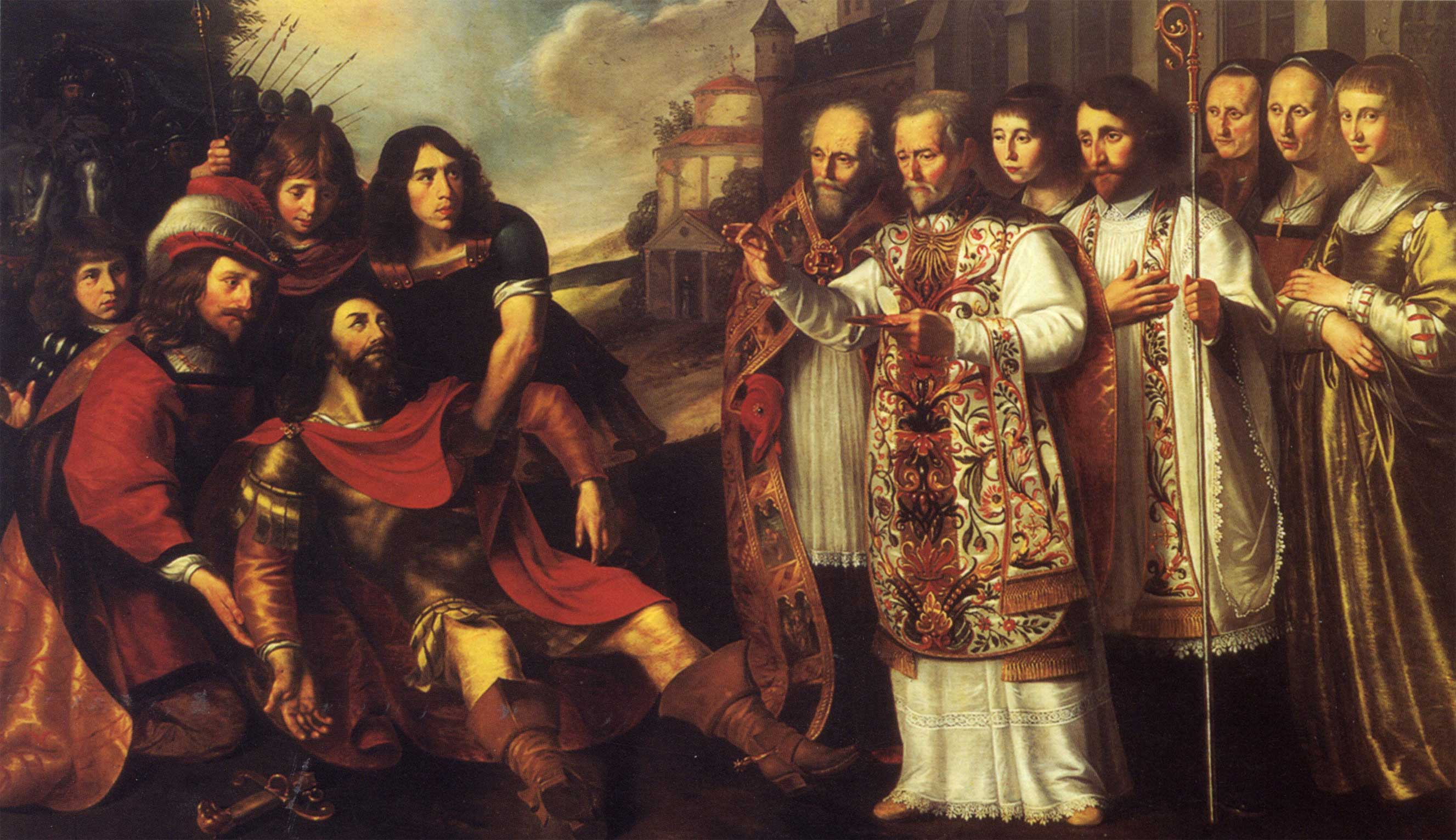 Bernardus van Clairvaux bekeert Willem van Aquitanië